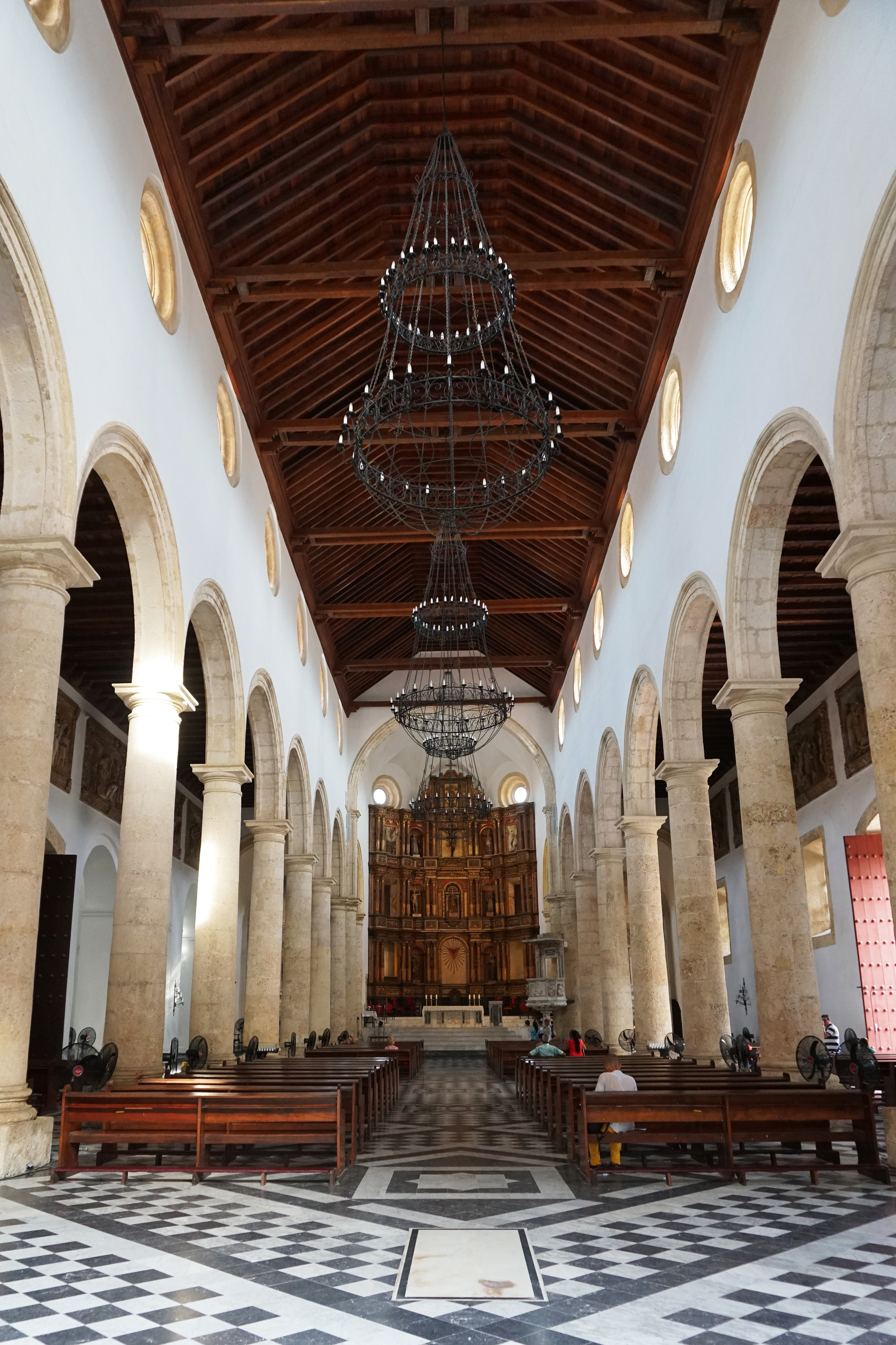 Nave central de la Catedral Santa Catalina de Alejandria, Cartagena de Indias